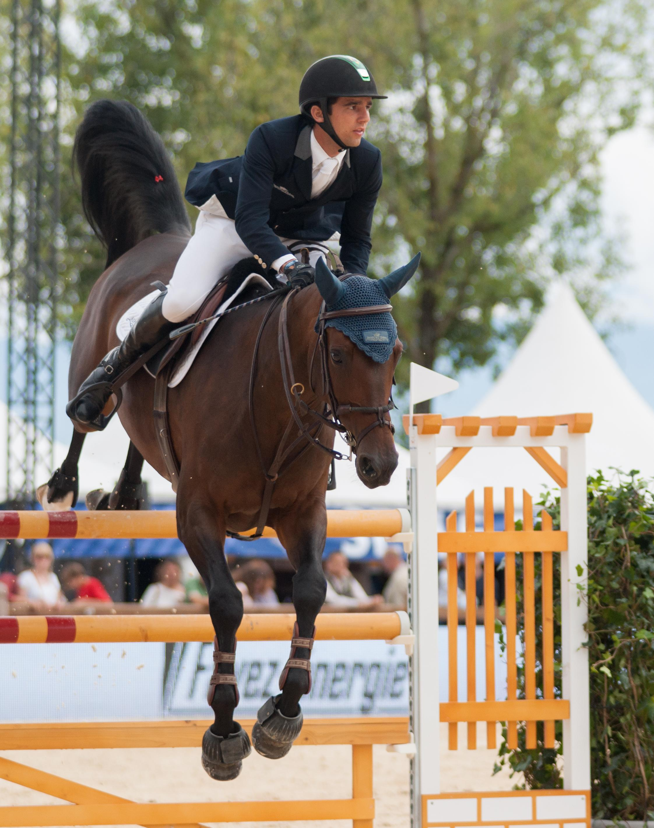 Marlon Módolo Zanotelli & Madame Butterfly at Lausanne International Horse Show.